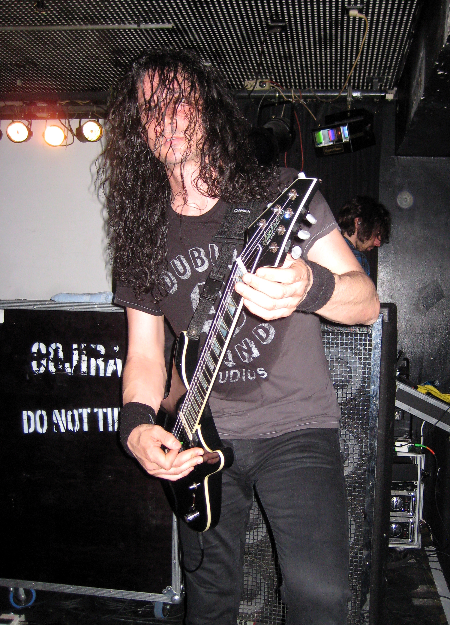 Gojira live @ Nachtleben, Frankfurt/Main